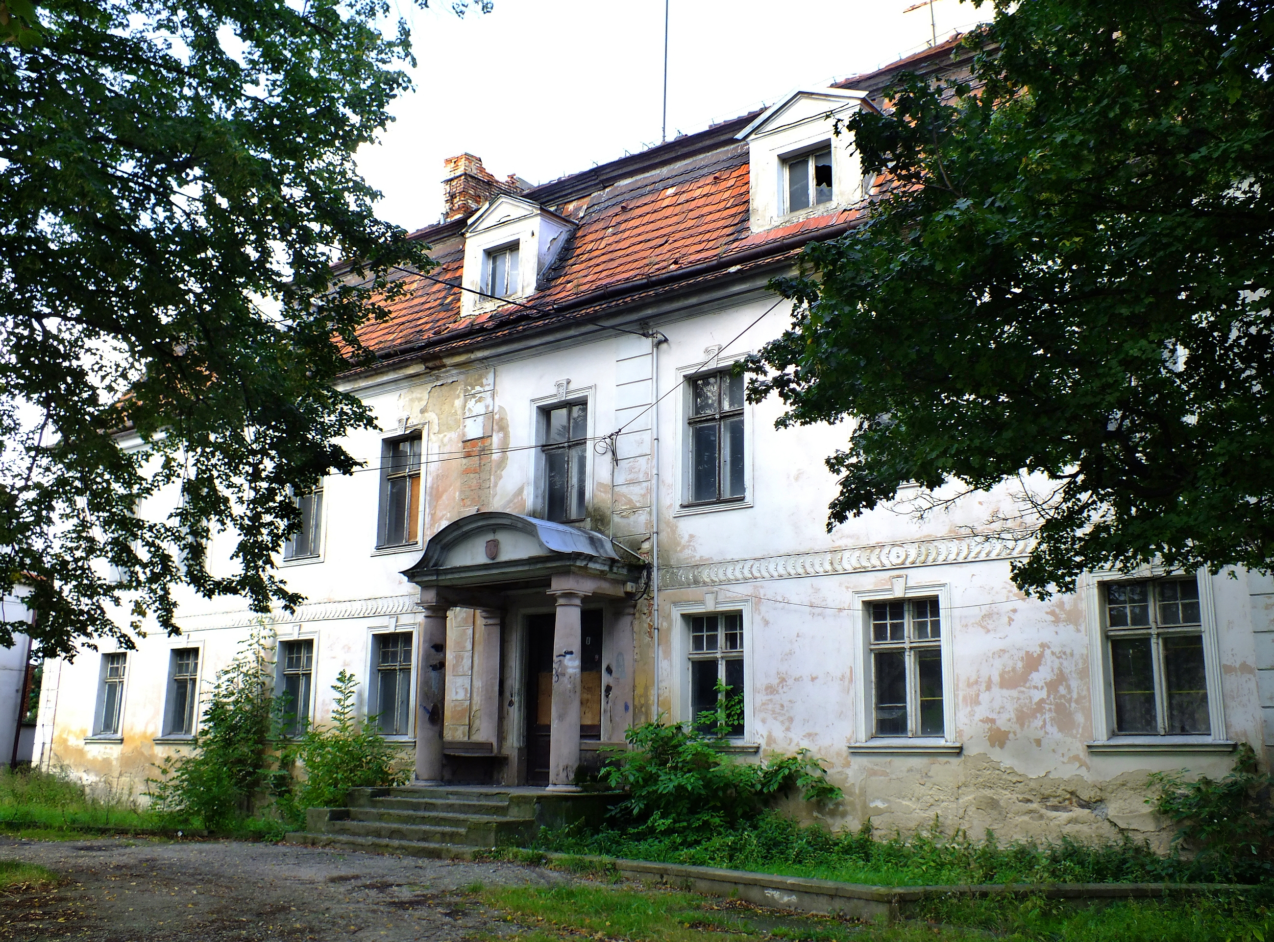 Komorów - pałac (zabytek nr 914/Wł z dn. 31.12.1982)